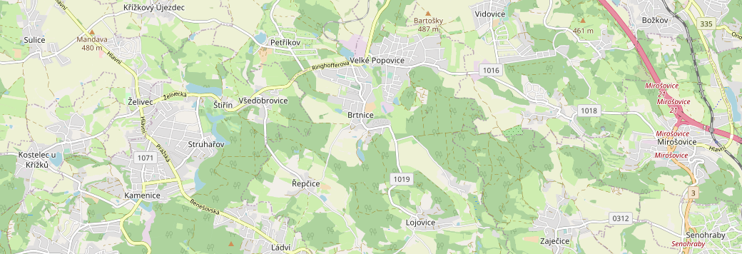 Oblast Velkopopovicka a Kamenicka, naučná stezka Krajinou barona Ringhoffera